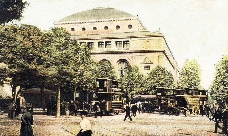 Théâtre du Châtelet, Paris, France, c. 1900